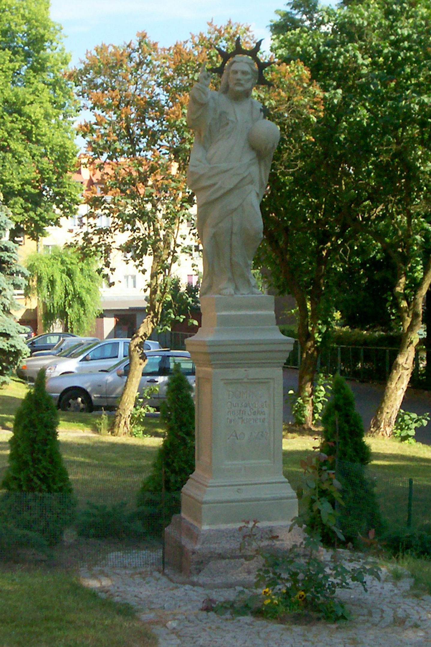 Figura Chrystusa trzymającego kulę zięmską, zlokalizowany przed Kościołem Najświętszego Serca Jezusowego w Olsztynie